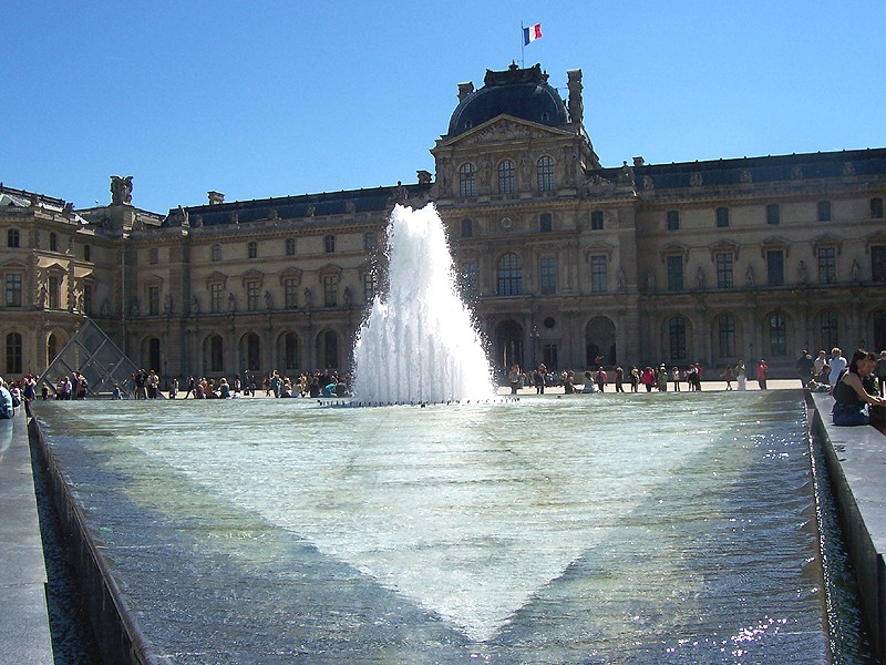 Parigi - Fontana della Pyramide del Louvre